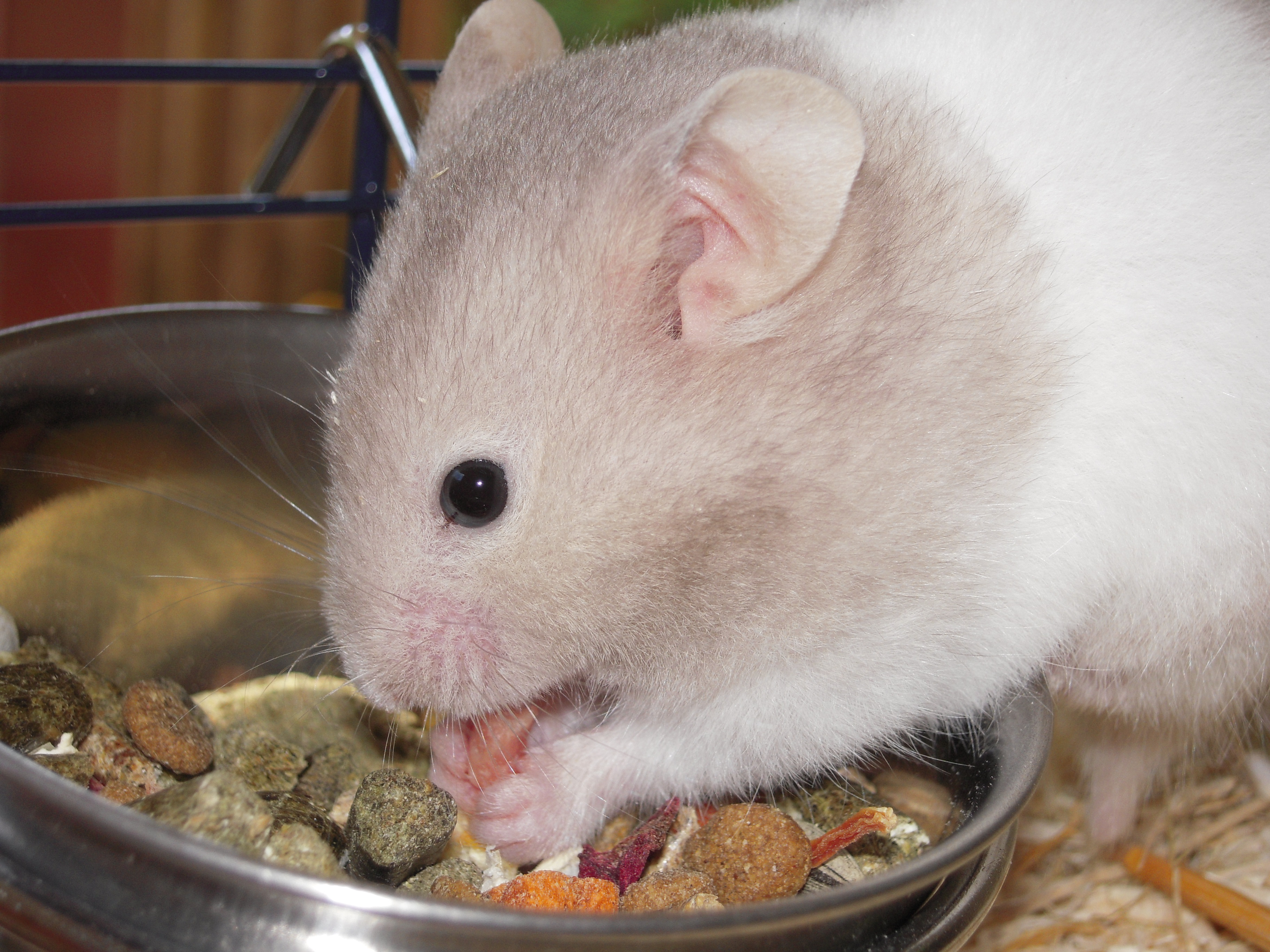 Ein weiblicher, fressender Goldhamster